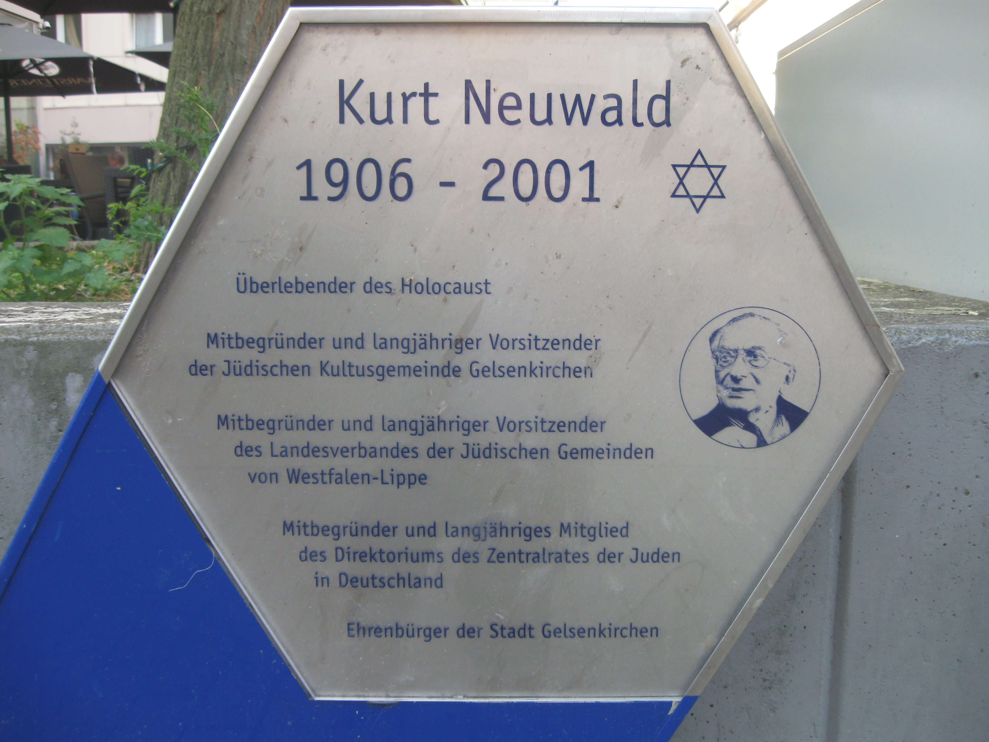 Kurt-Neuwald-Platz auf der Arminstraße in unmittelbarer Nähe des ehemaligen Geschäftssitzes der Firma "Betten Neuwald" in Gelsenkirchen-Altstadt. Auf dem 2005 eingeweihten Platz befindet sich eine Gedenktafel für den 2001 verstorbenen Gelsenkirchener Geschäftsmann Kurt Neuwald.